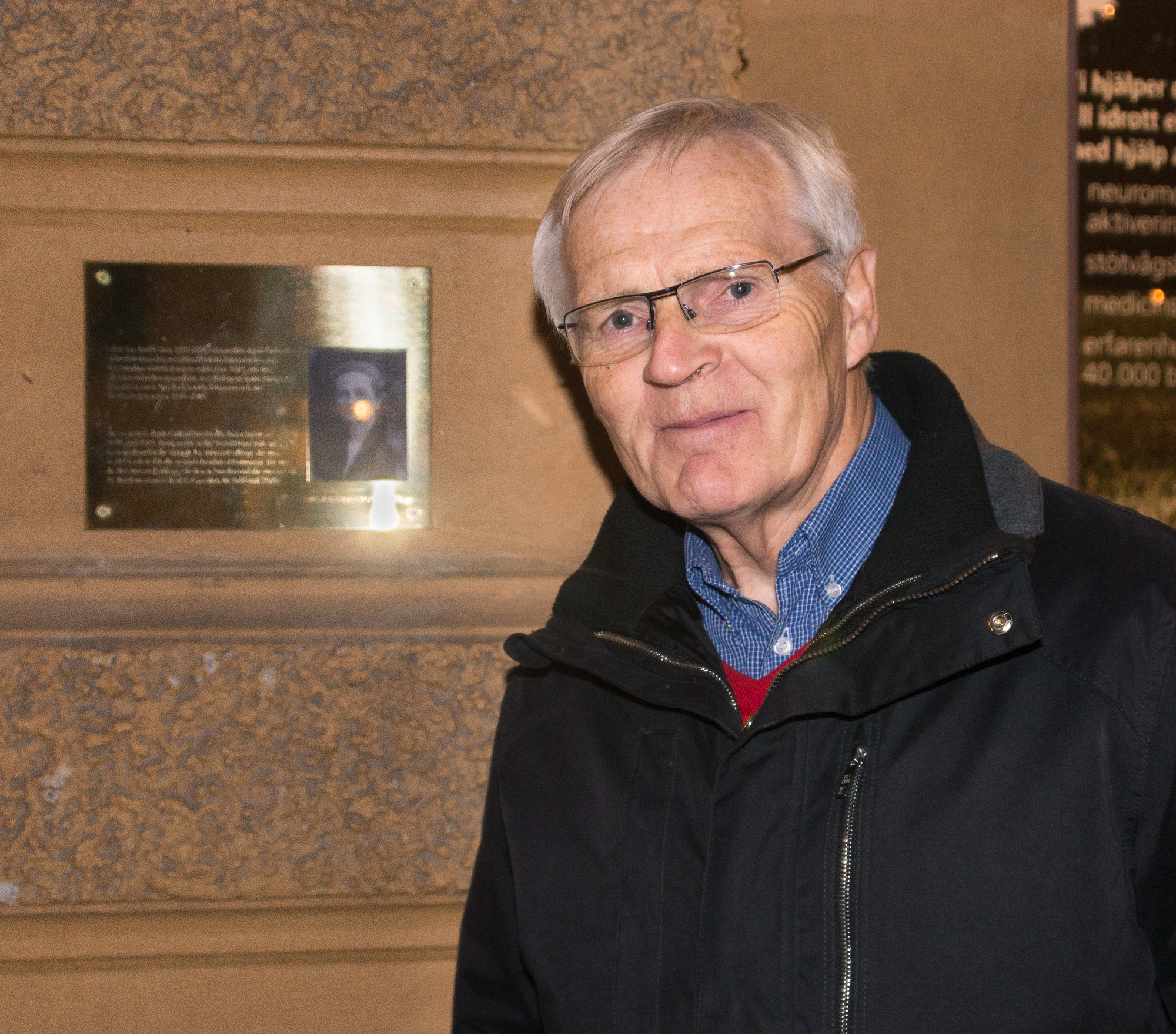 Bo Ringholm den 27 november 2019 vid invigningen av minnesmärket över Agda Östlund på Upplandsgatan 61 i Stockholm.